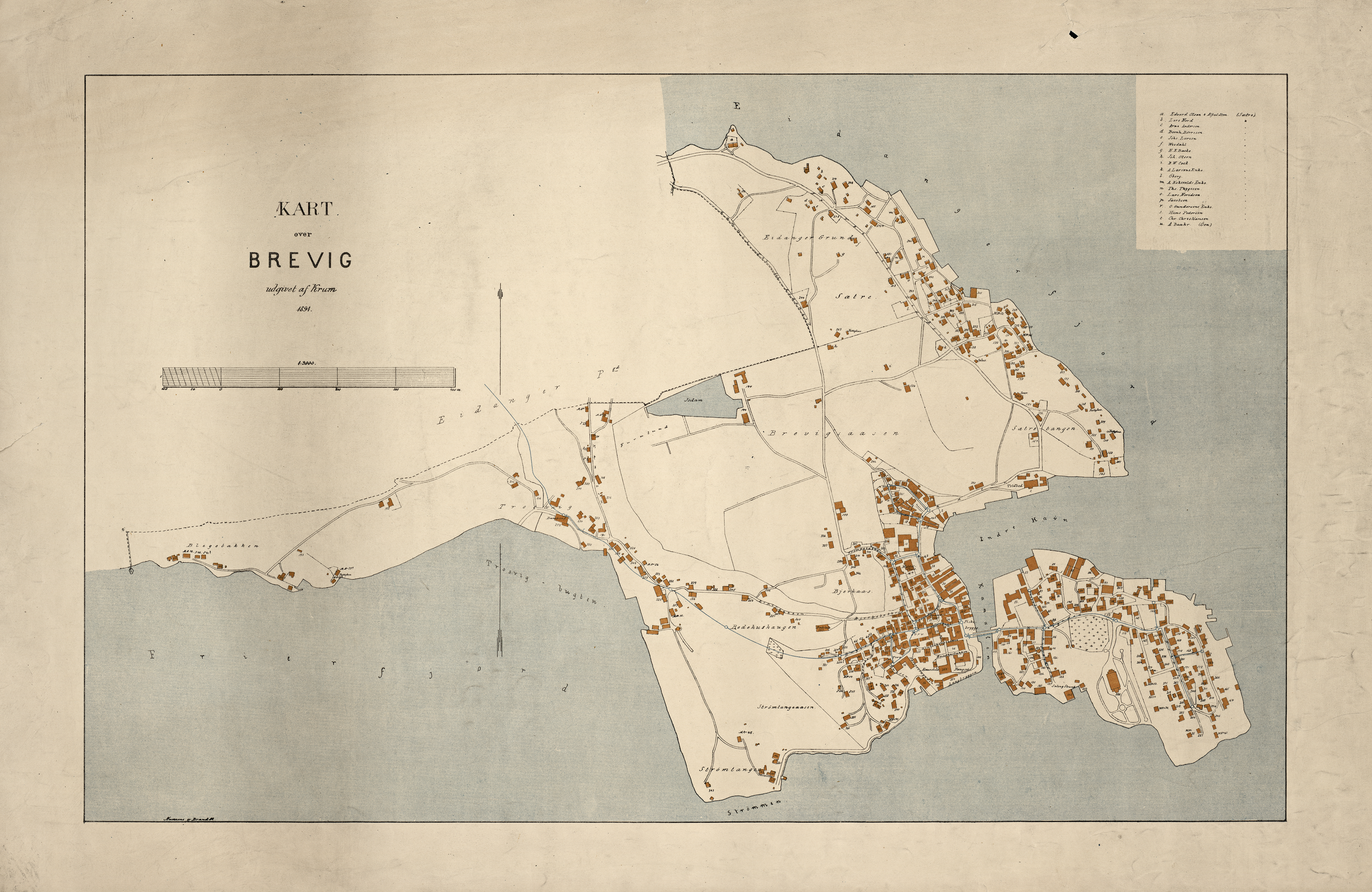 NS Krums kart over Brevig fra 1891.